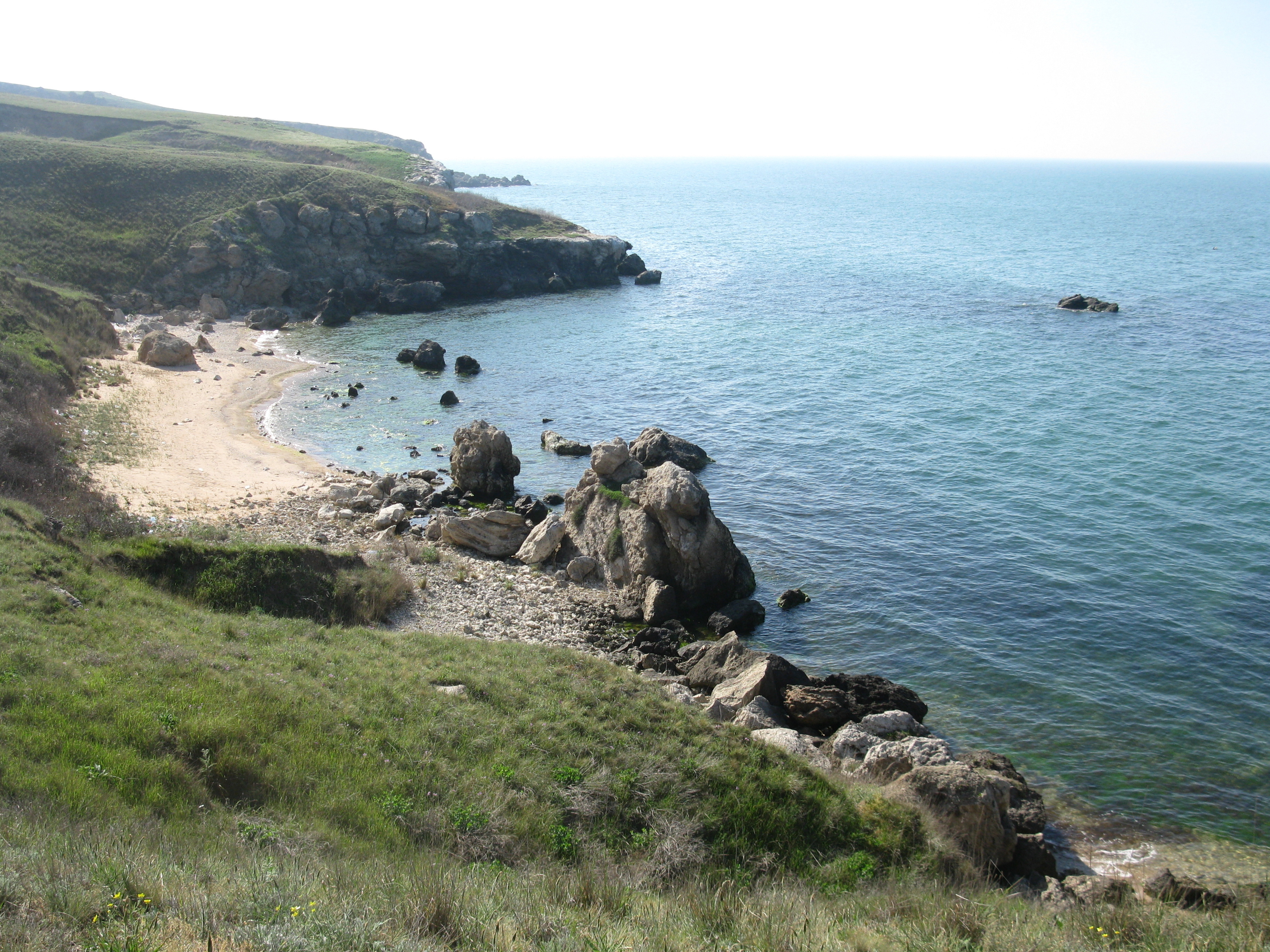 Виды Казантипа